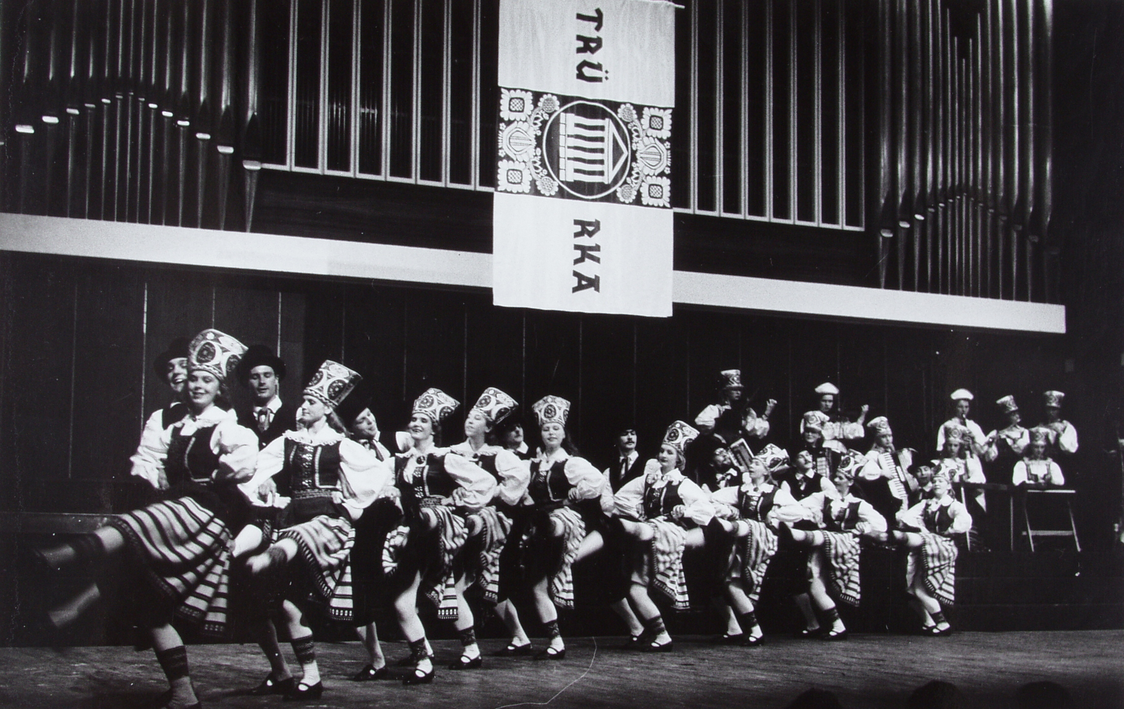 TRÜ RKA juubelikontsert 1985. aastal.